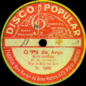 Selo no disco de 78 rpm com gravação da marchinha carnavalesca de Sinhô "O Pé de Anjo" do cantor Francisco Alves, pela gravadora "Popular", Rio de Janeiro, 1919.